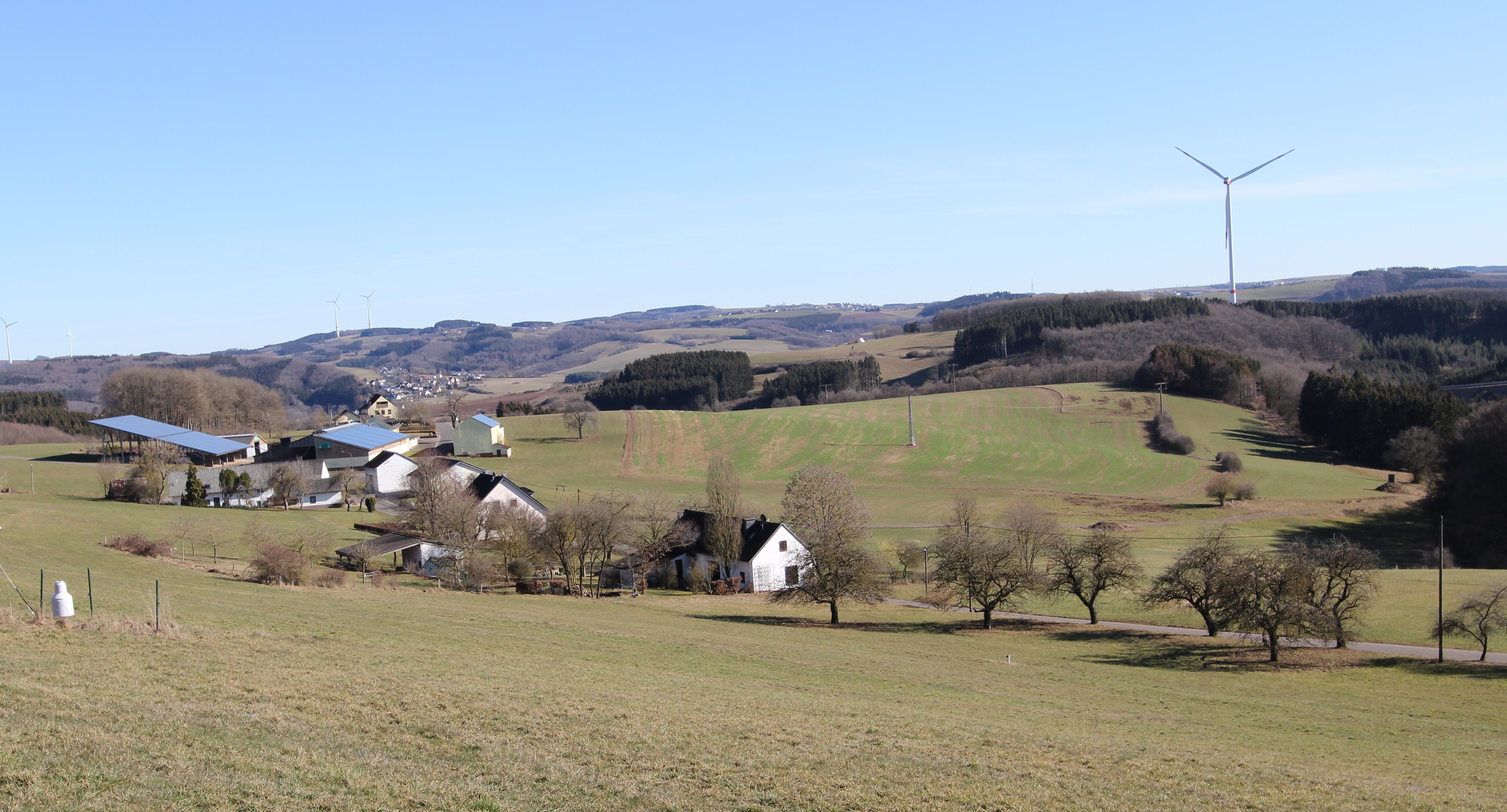 Strickscheid in der Eifel gehört zur Verbandsgemeinde Arzfeld und liegt zwei Kilometer westlich von Lünebach und zehn Kilometer südwestlich der Stadt Prüm auf den Islek-Höhen. Aufnahme von 2019.